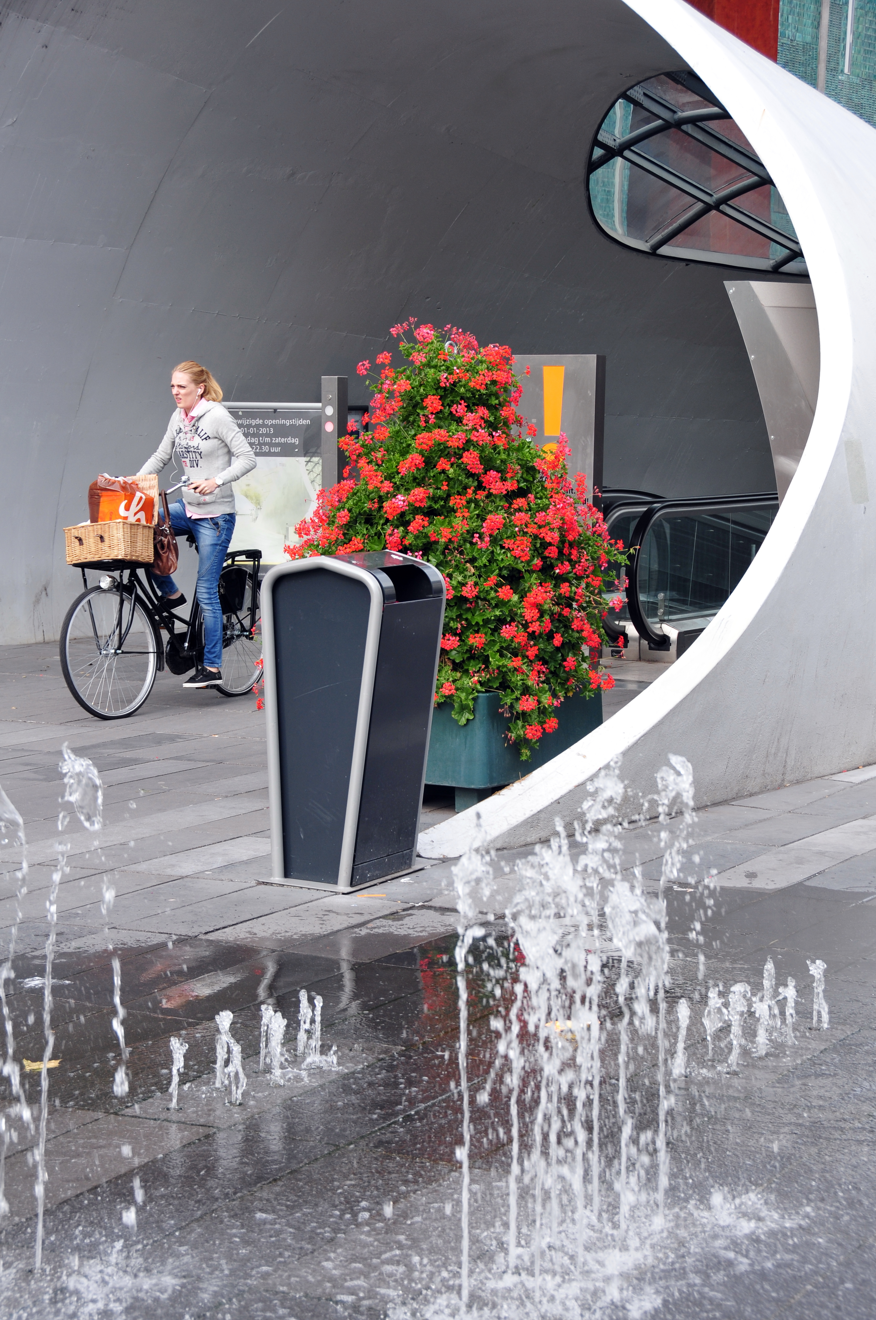 Eindhoven, Niederlande, 2013 Eingang unterirdeischen Fahrradabstellplätze am Septemberplein